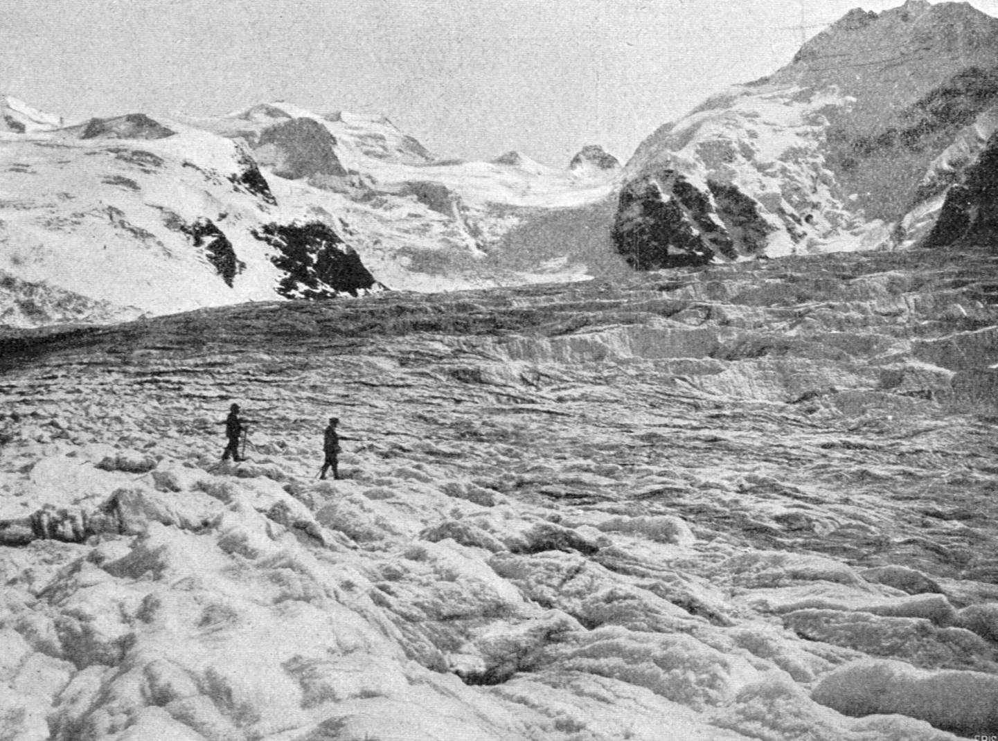 Der Morteratschgletscher um das Jahr 1890, recht hinten Piz Bernina (4.049 m)